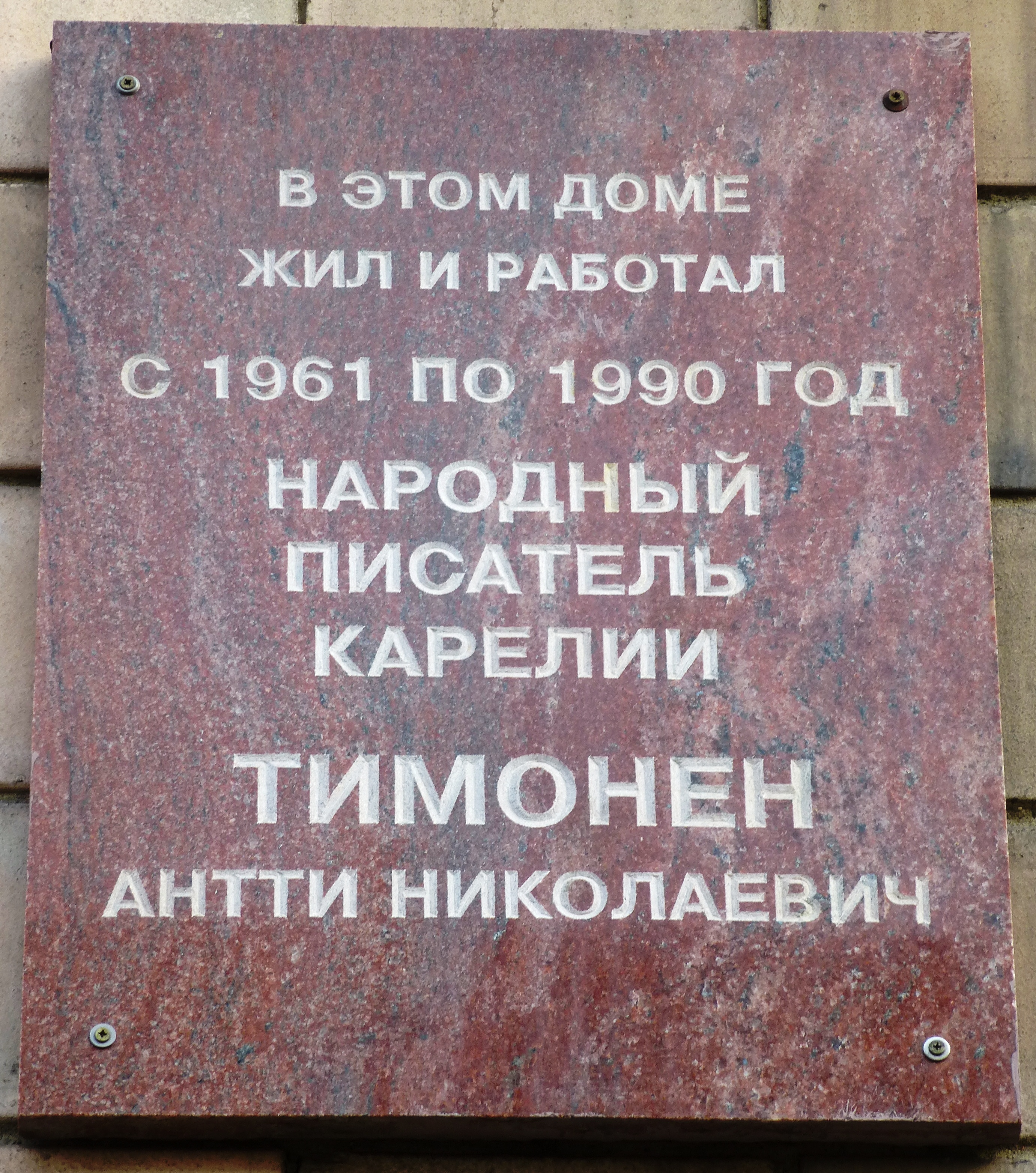 Памятная доска Тимонену А.Н. в Петрозаводске на ул.Куйбышева д.9